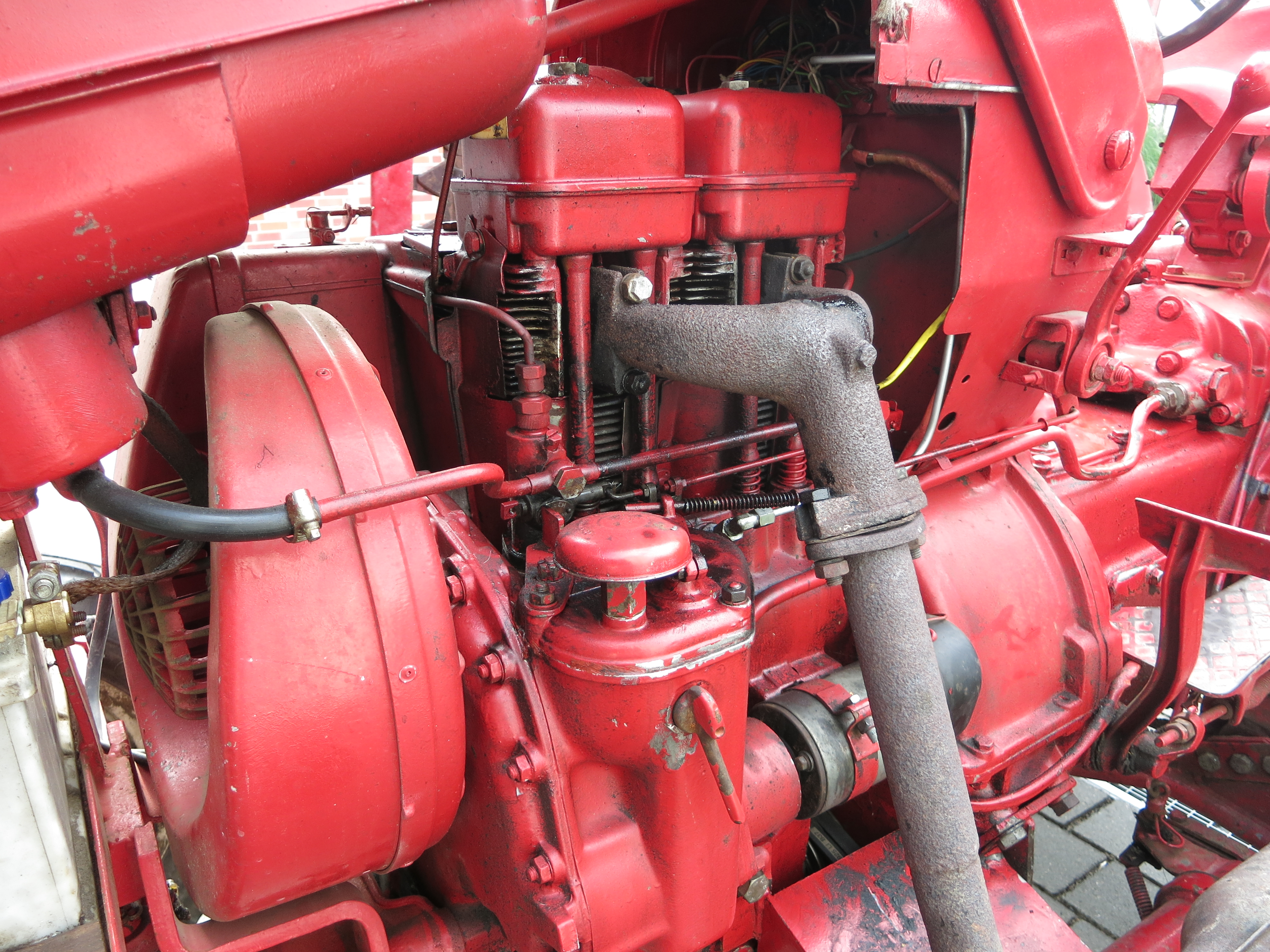 Dieselmotor Porsche F 218 eines Porsche 218Technische Daten: Funktionsprinzip: Luftgekühlter Saugdieselmotor mit Wirbelkammerverfahren, OHV Bohrung x Hub: 95 x 116 mm Hubraum: 1644 cm³ Leistung: 18,4 kW bei 2000/min Max. Drehmoment: 91 N m bei 1800/min